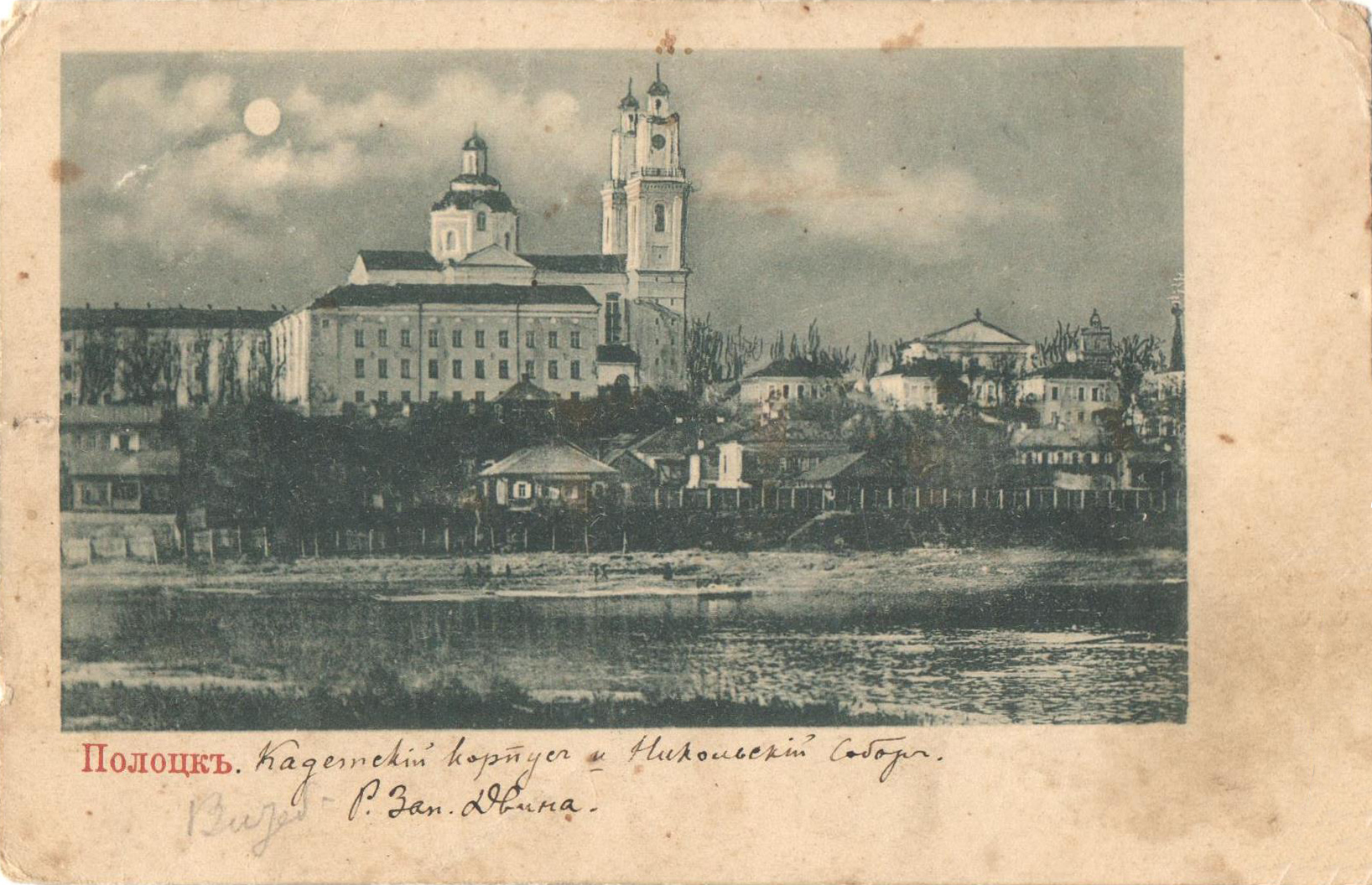 Беларуская (тарашкевіца): Полацак (Połacak), рака Дзьвіна (Dźvina). Езуіцкі калегіюм з касьцёлам Сьвятога Стэфана і дамініканскі касьцёл